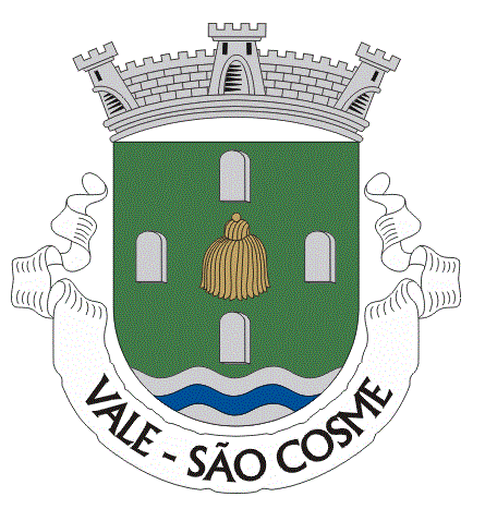 Borla dourada ligada à hagiografia, representando os patronos de Vale São Cosme e São Damião . Marcos de propriedade (a cinzento) que, ao longo dos séculos delimitaram as terras de S. Cosme. Rio Pelhe que travessa o vale,aparece na parte inferior do brasão.